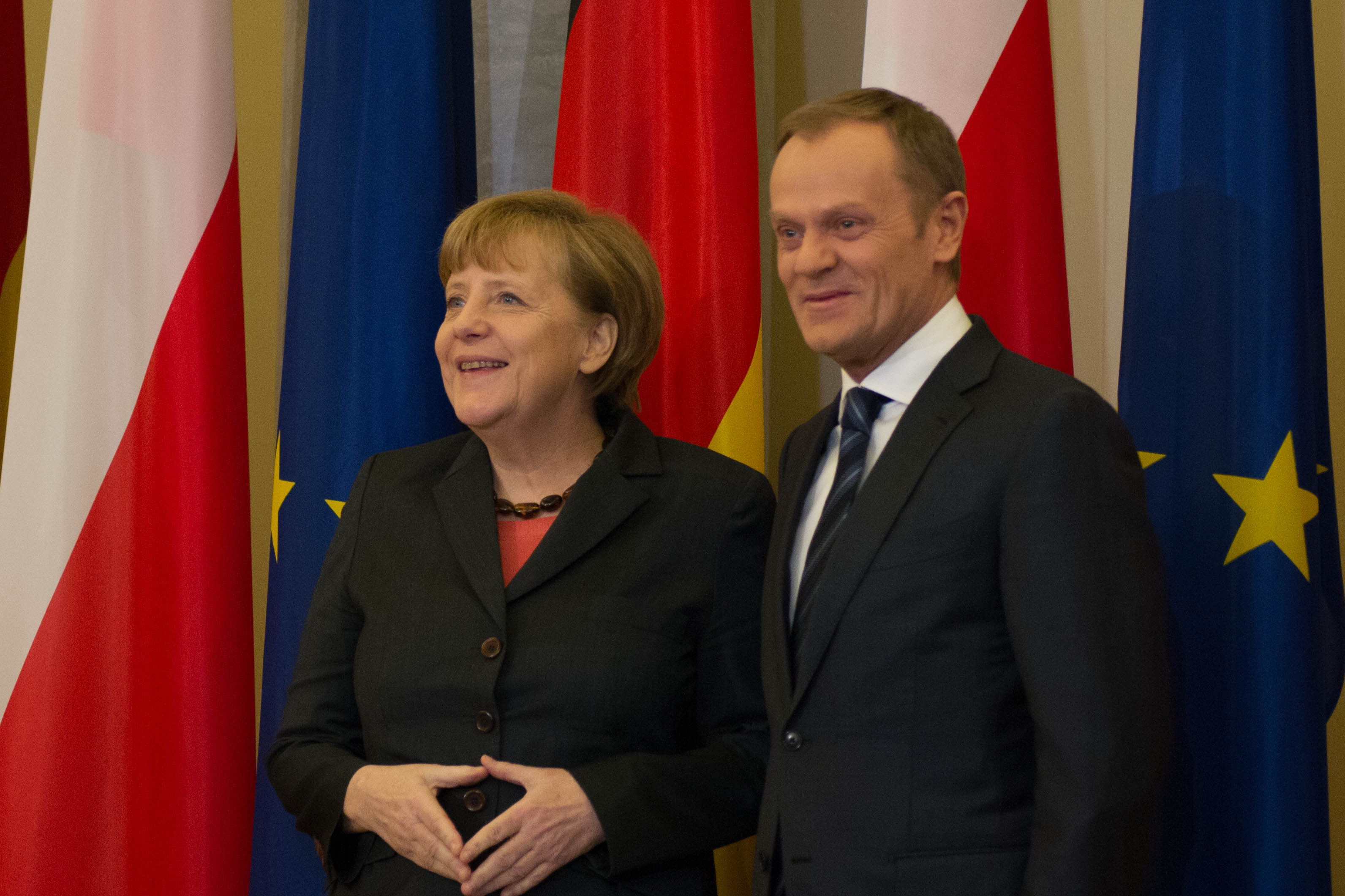 Spotkanie Tusk-Merkel 12.03.2014